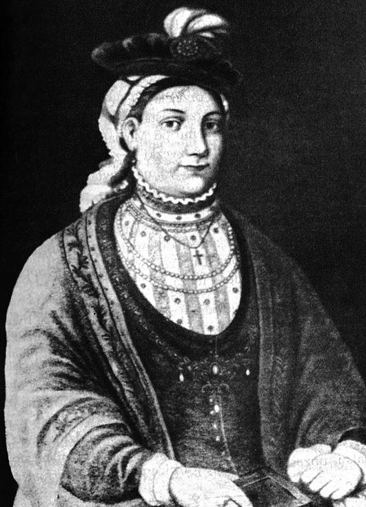 Raina Mohylanka Wiśniowiecka